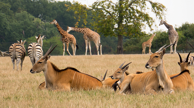 Knuthenborg Safaripark ligger på Lolland og har mere end 1200 dyr, der lever stort set frit.